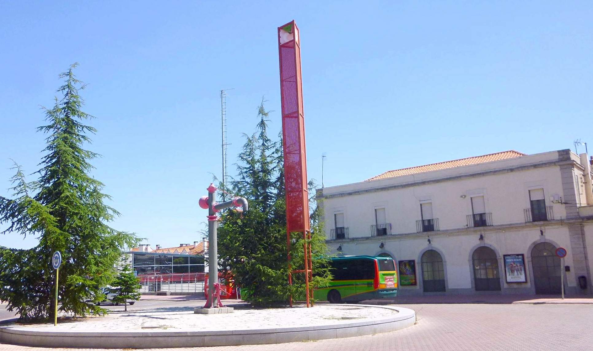 El Escorial - Estación de Adif